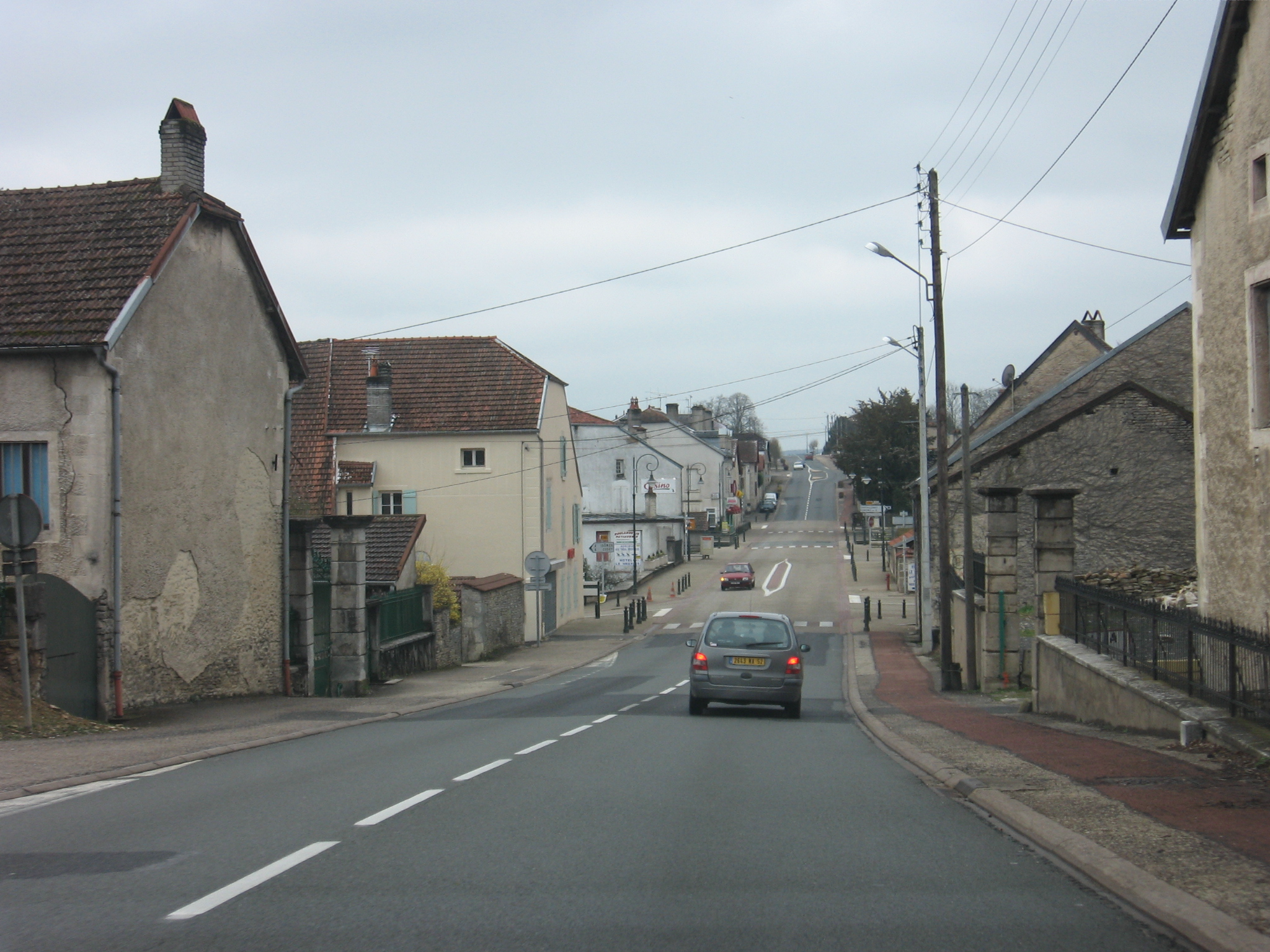 Vaux-sous-Aubigny, Haute-Marne